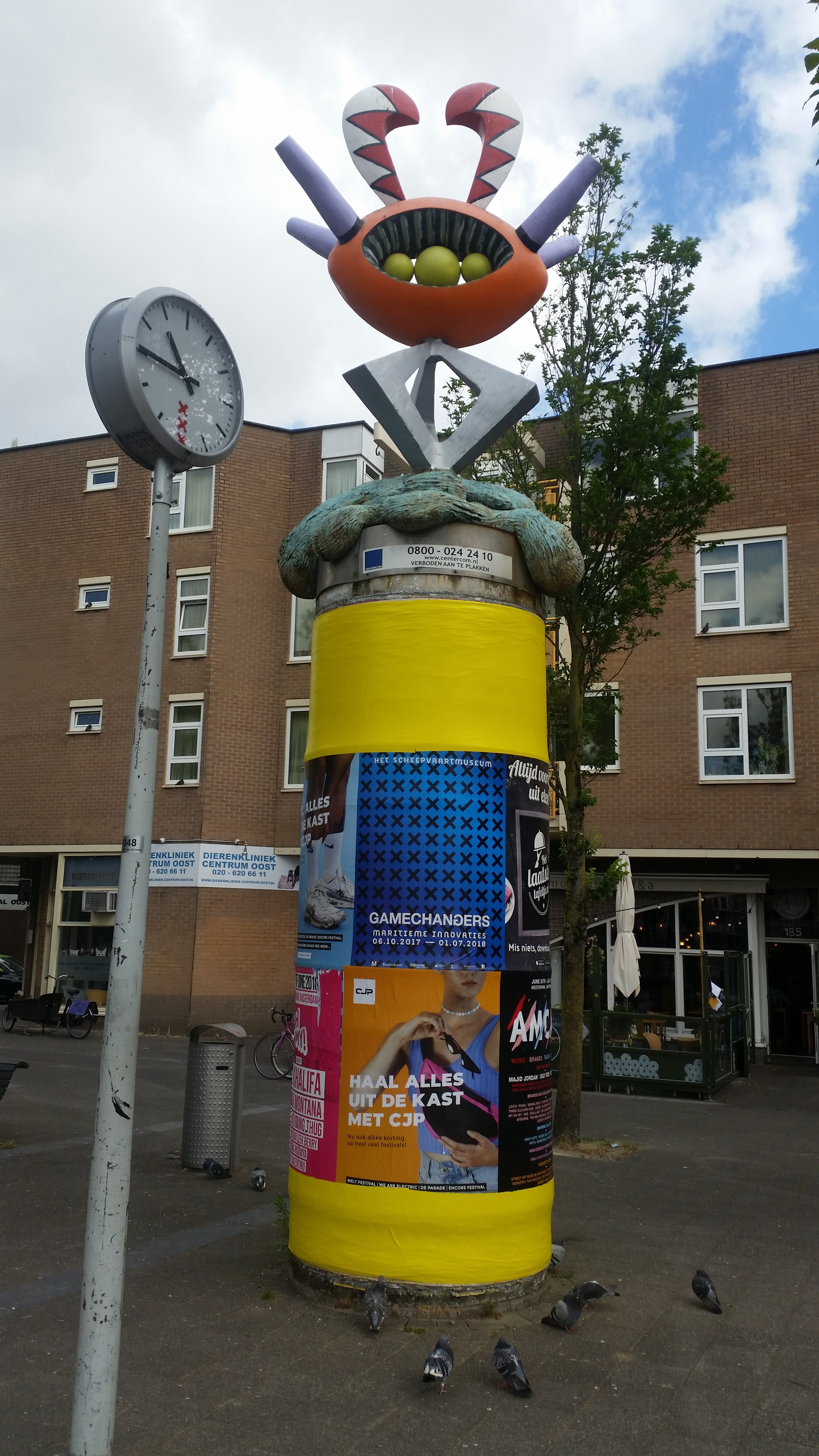 Mbulu Ngulu (Schabracq); voor- of achteraanzicht